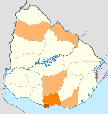 Presencia del Programa de Fortalecimiento del Vínculo Escuela Familia Comunidad en el territorio nacional.